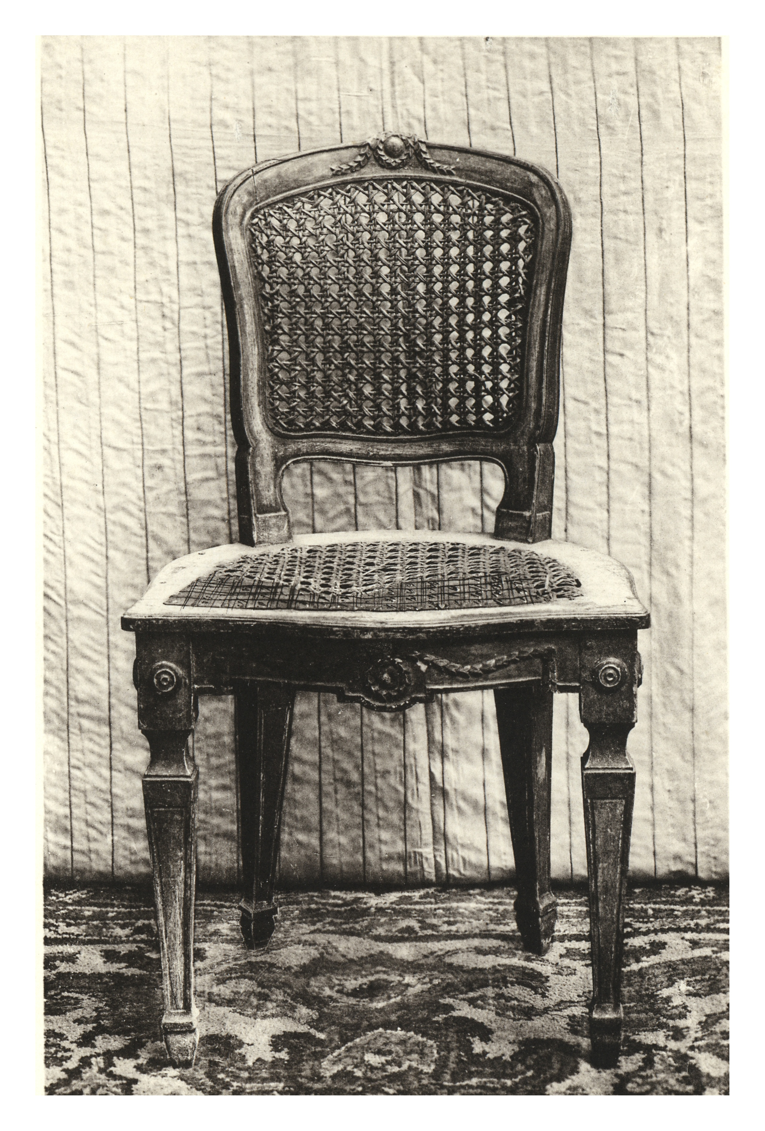 Stuhl, Übergang von Rokokoformen zu klassizistischen. Die geschwungenen Linien der Rückenlehnen und Sitzrahmen stehen im Gegensatz zu den geraden kantigen Beinen und den bereits antikisierenden Motiven des Zierates. Rotbuchenholz, weiß gestrichen, grün verziert.Strohgeflecht gelb, mit grünen Fäden durchkreuzt.